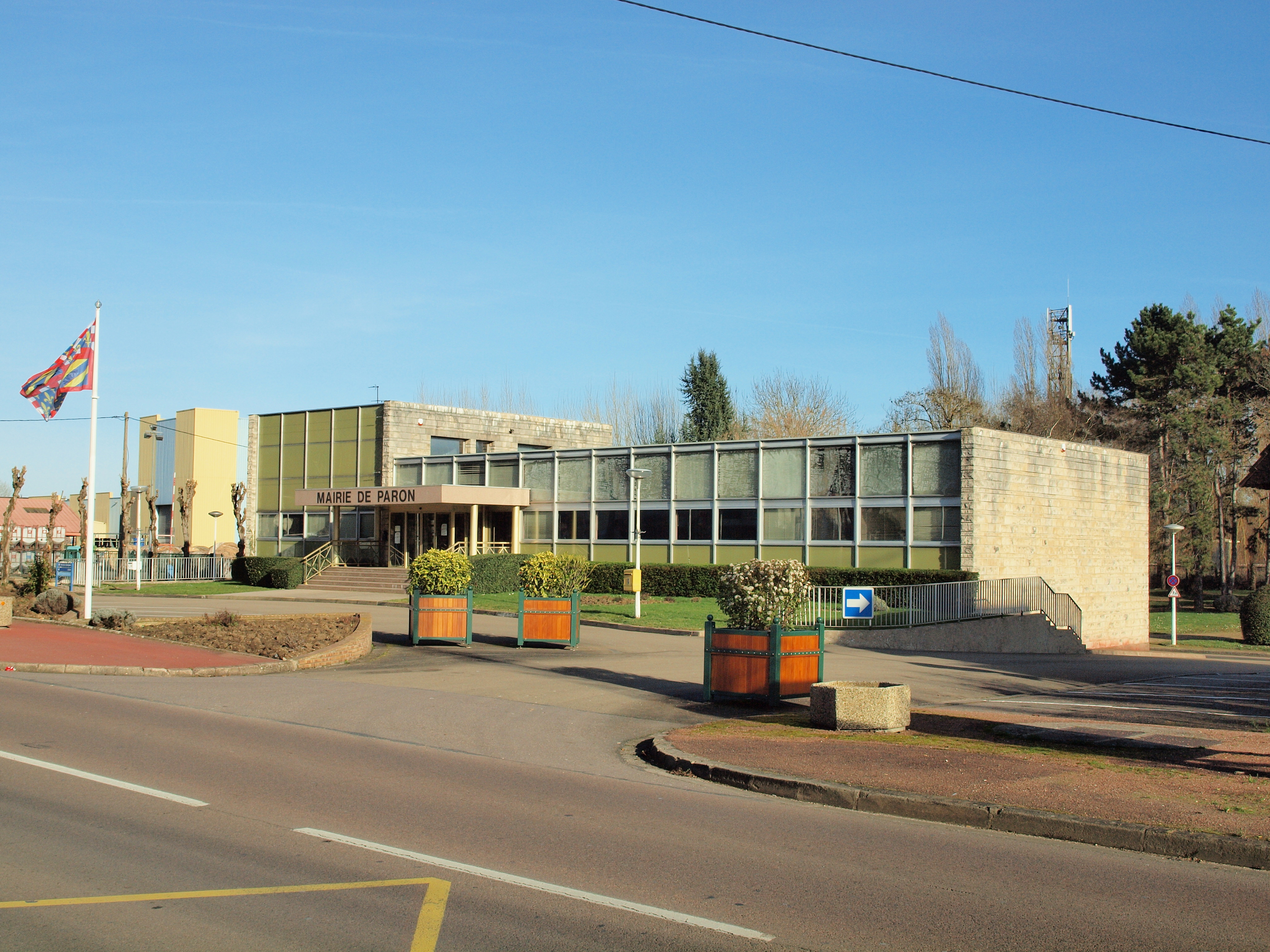 Paron (Yonne, France)